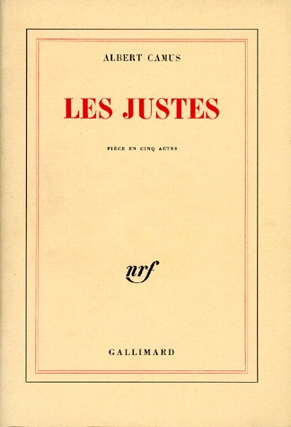 Copertina della prima edizione del dramma «Les Justes» di Albert Camus